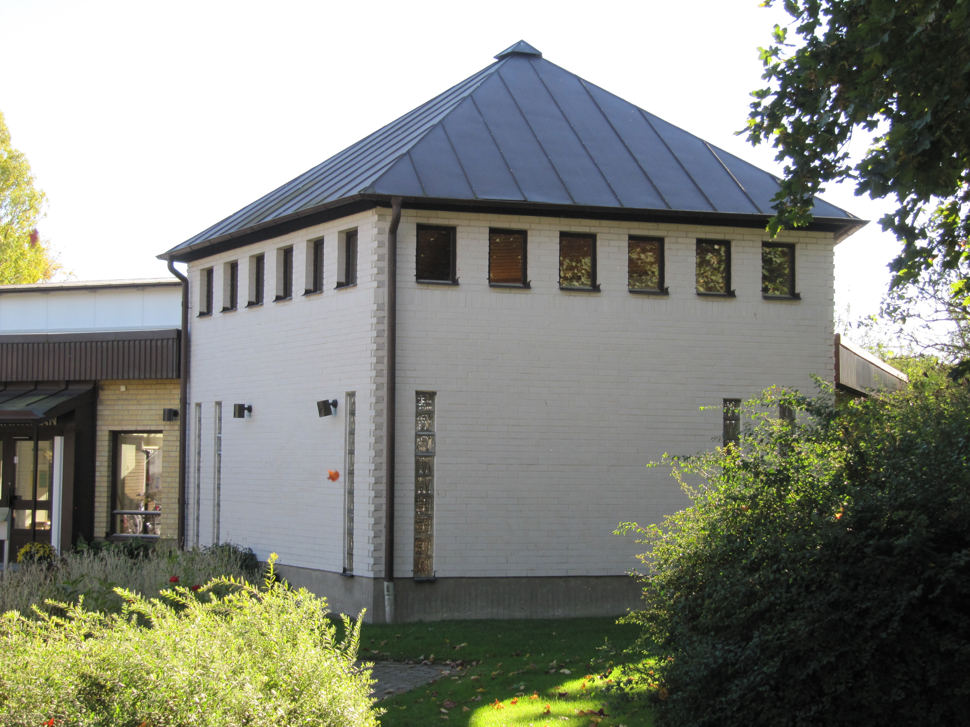 Årstakyrkan